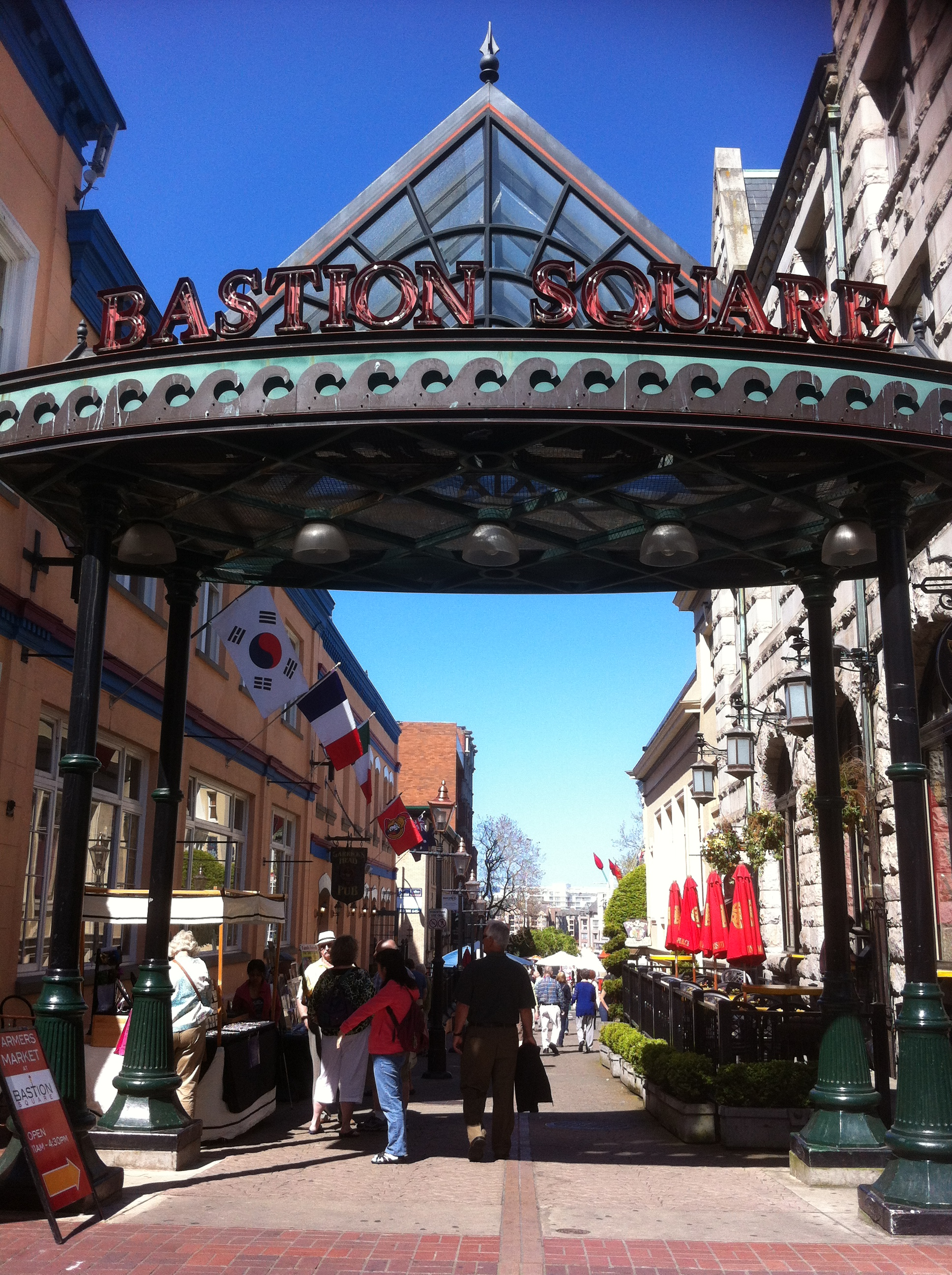 victoria